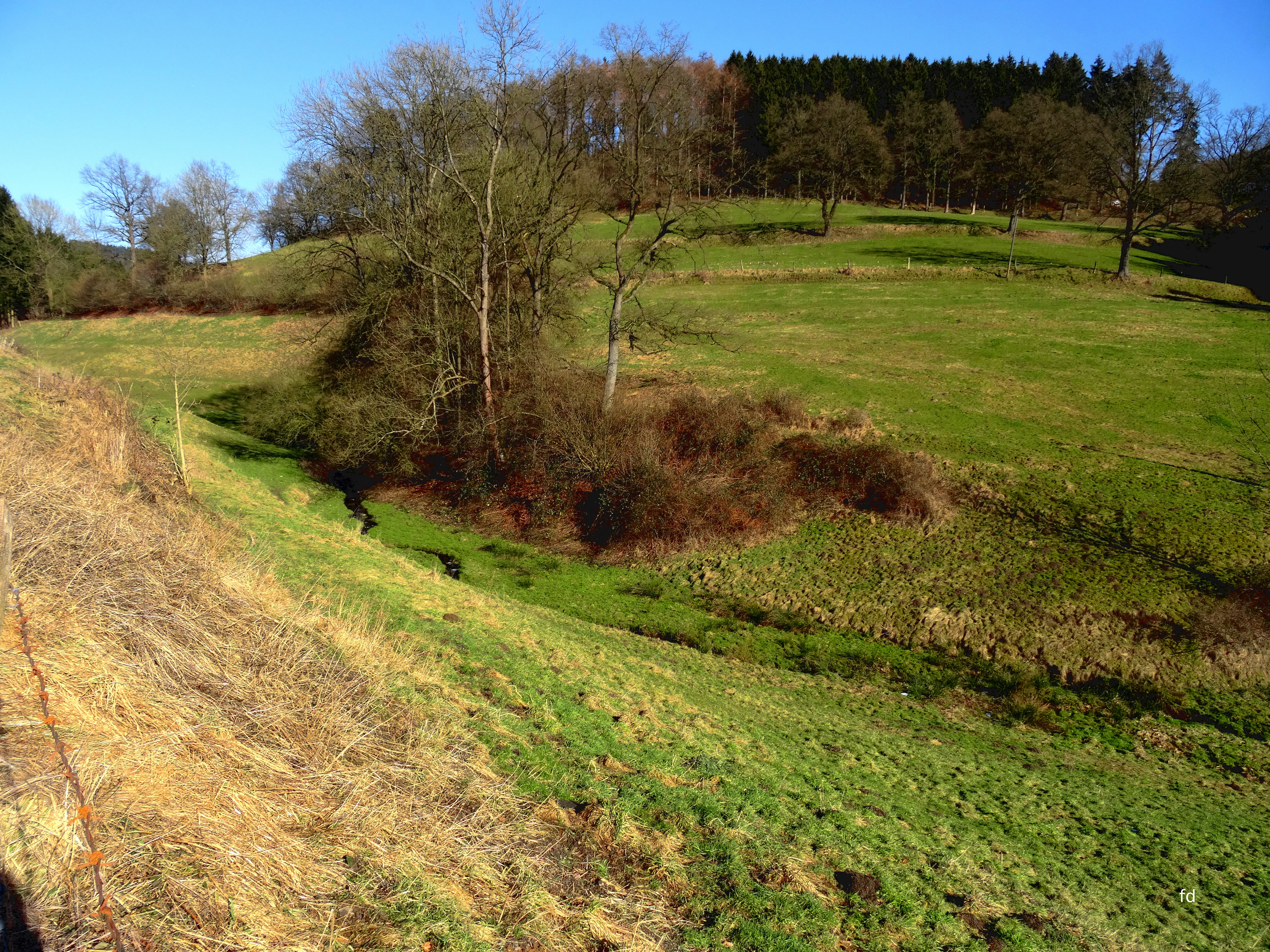 Das Bachtal der Luchtmücke östlich von Eversberg; Landschaftsschutzgebiet „Ruhrtal östlich Meschede und Talraum östlich“ (LSG 4615-149); Stadtgebiet Meschede